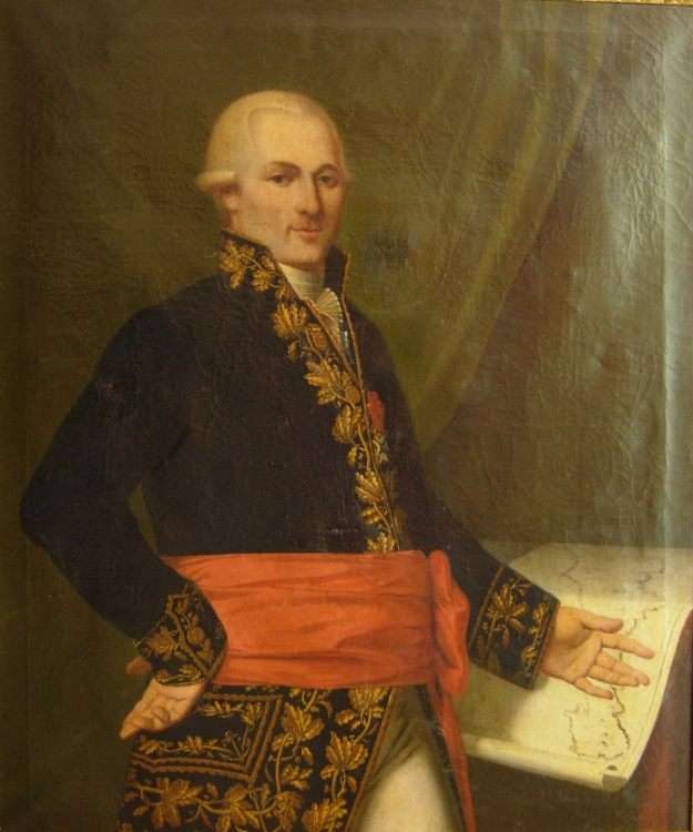 Portrait d'Armand de Saint-Félix (1737-1819), vice-amiral